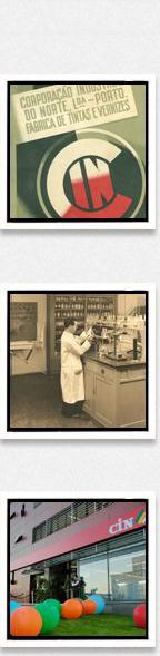 Historia da CIN